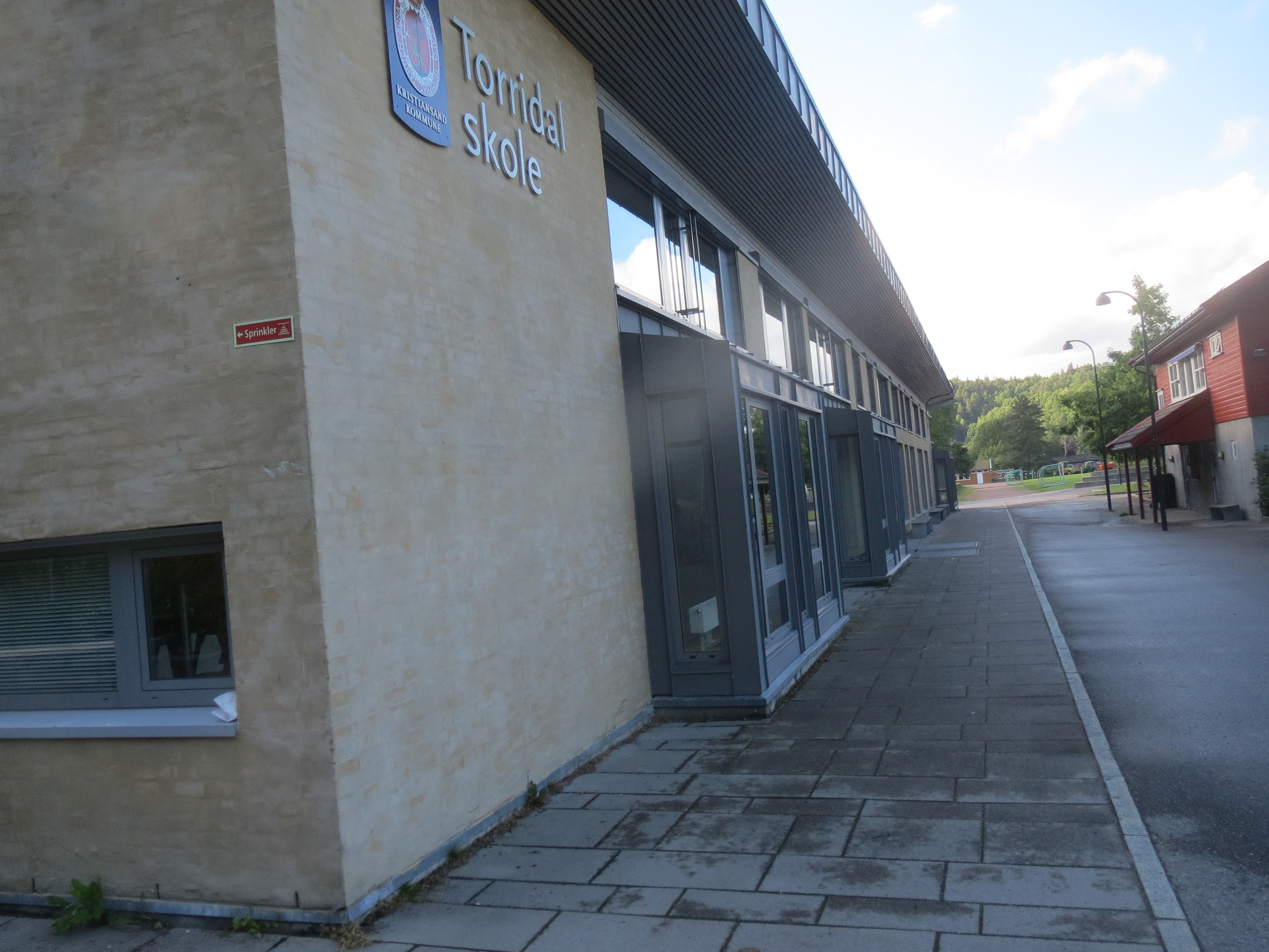 Torridal skole, Hommeren i Torridal, Kristiansand S